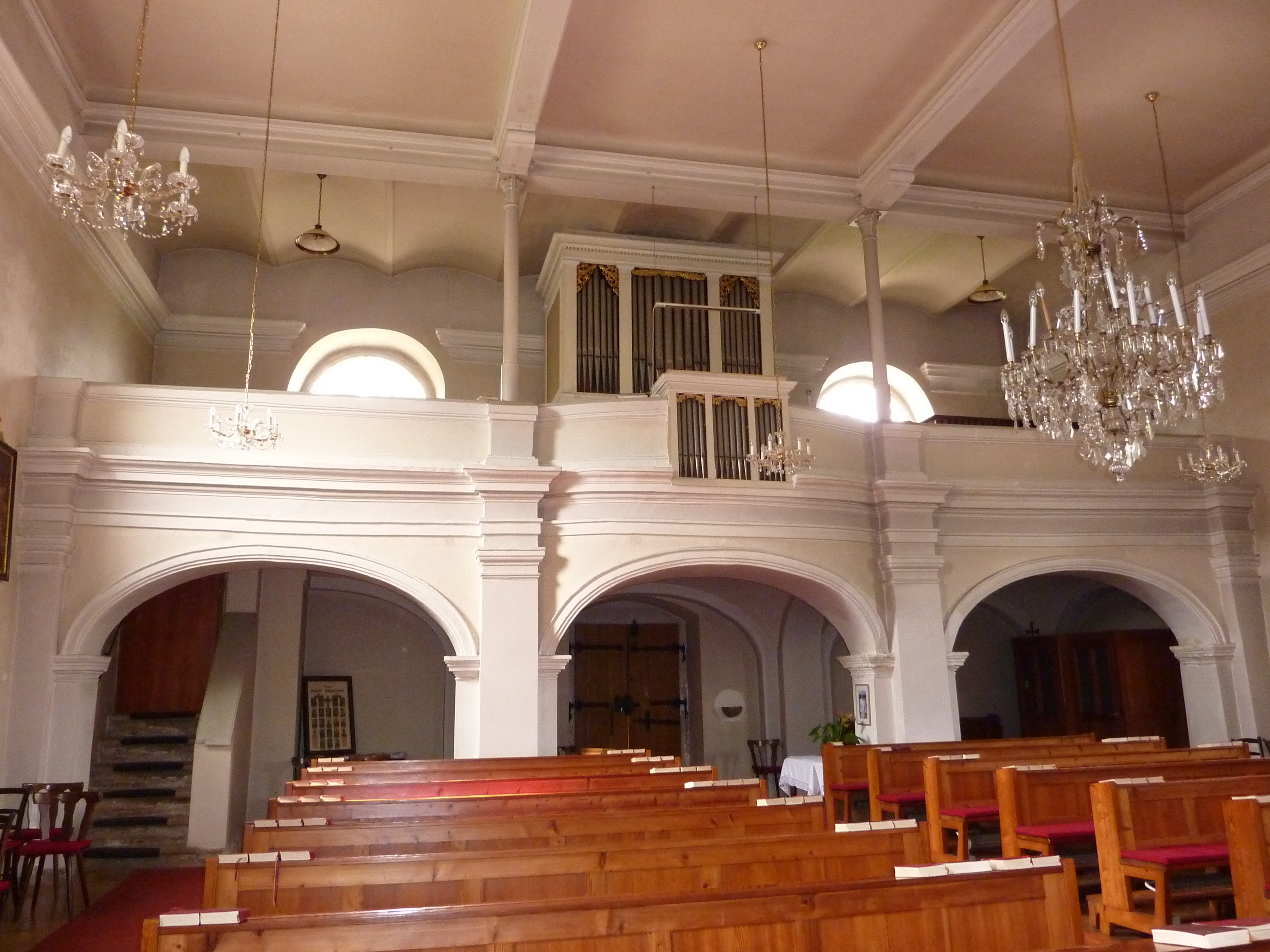 Pfarrkirche hl. Leonhard, Eckartsau, Niederösterreich - barocke Orgel mit klassizistischem Gehäuse, begonnen 1737 von Vinzenz Deutschmann, beendet von Franz Ullmann